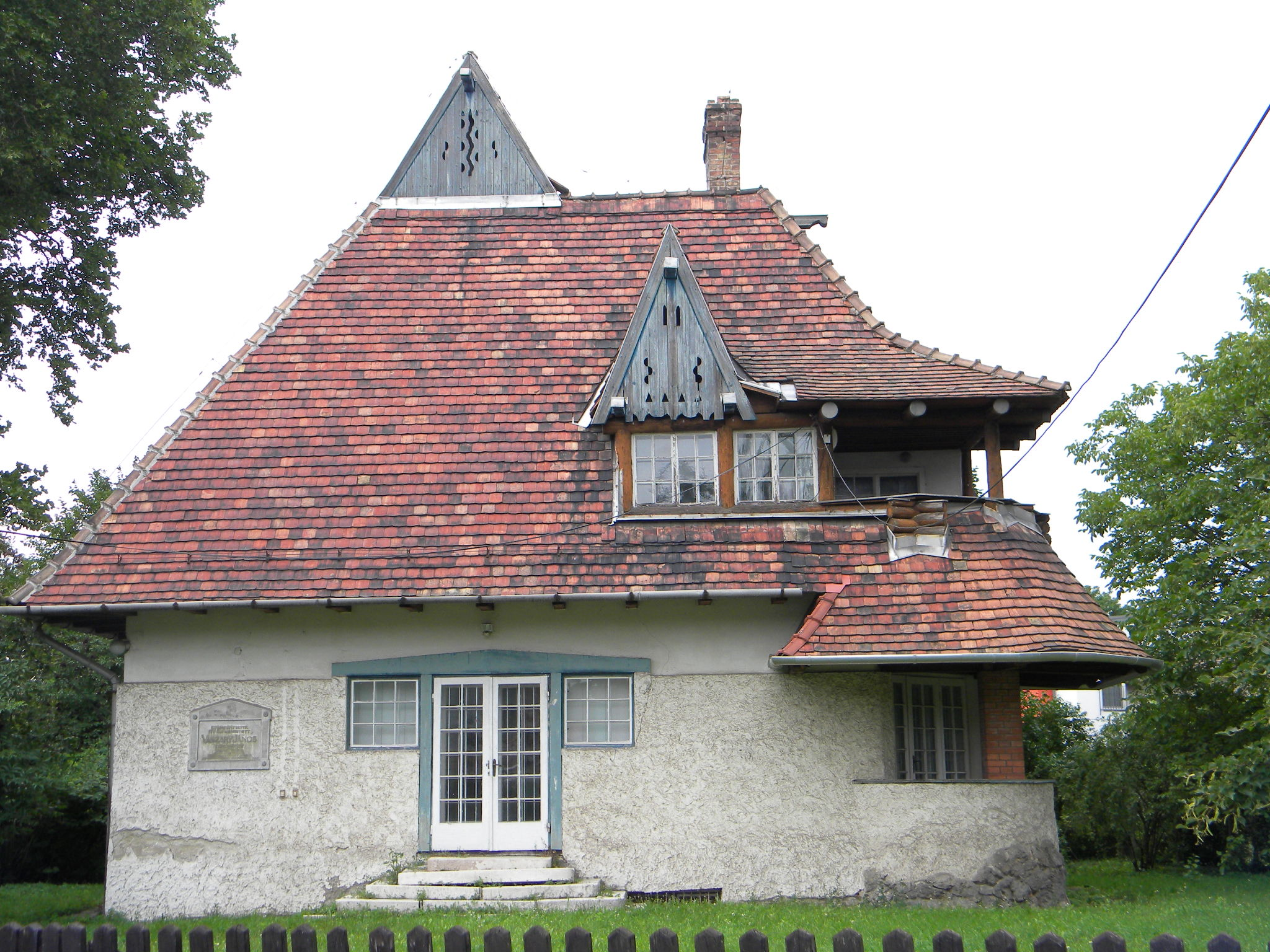 A Vaszary-villa a Tatán, a Művész közben. azonosító: 6450, törzsszám: 10710 Kertben, szabadon álló, földszintes, téglalap alaprajzú, jellemzően sátortetős villaépület. Építtette Vaszary János festőművész 1906-ban (építész: Toroczkai Wigand Ede).